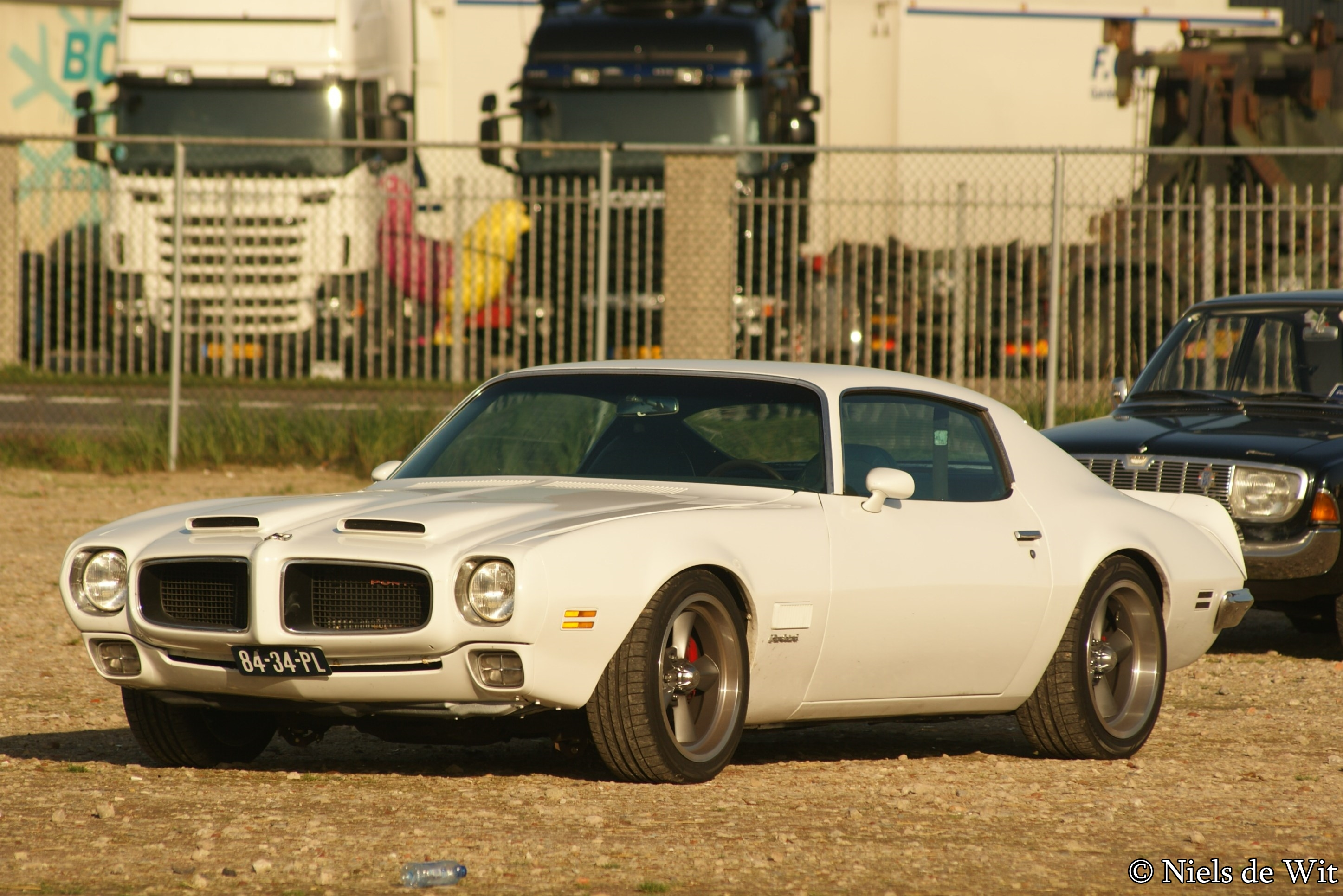 84-34-PL